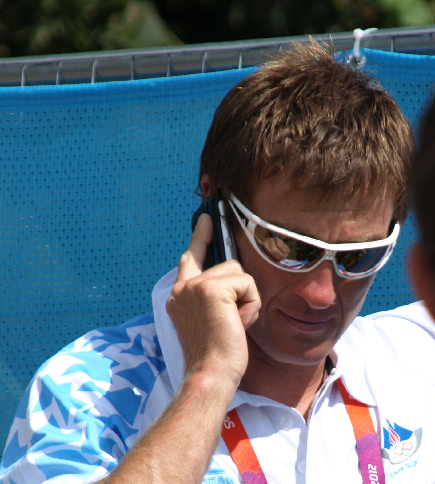 Iztok Čop